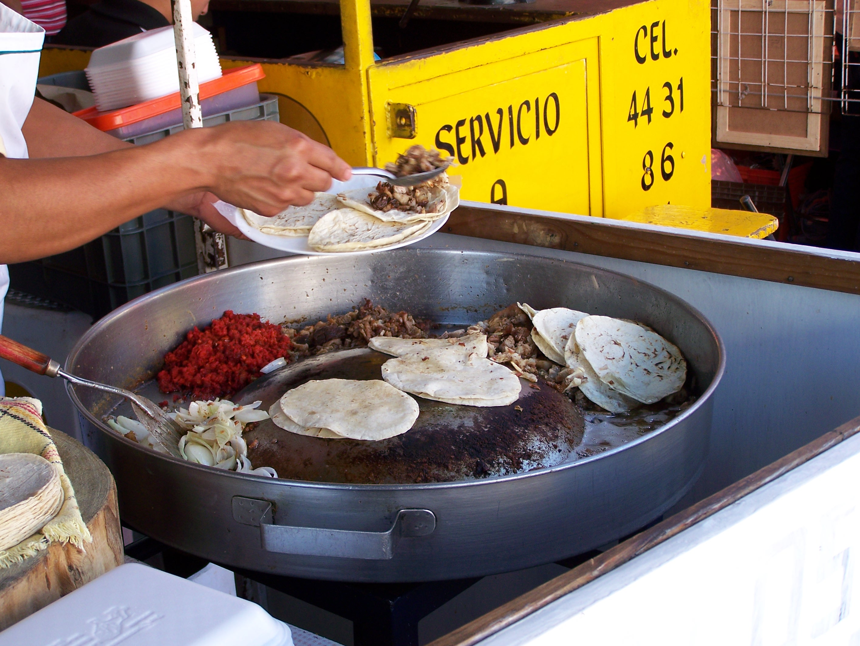 Preparación de tacos de suadero